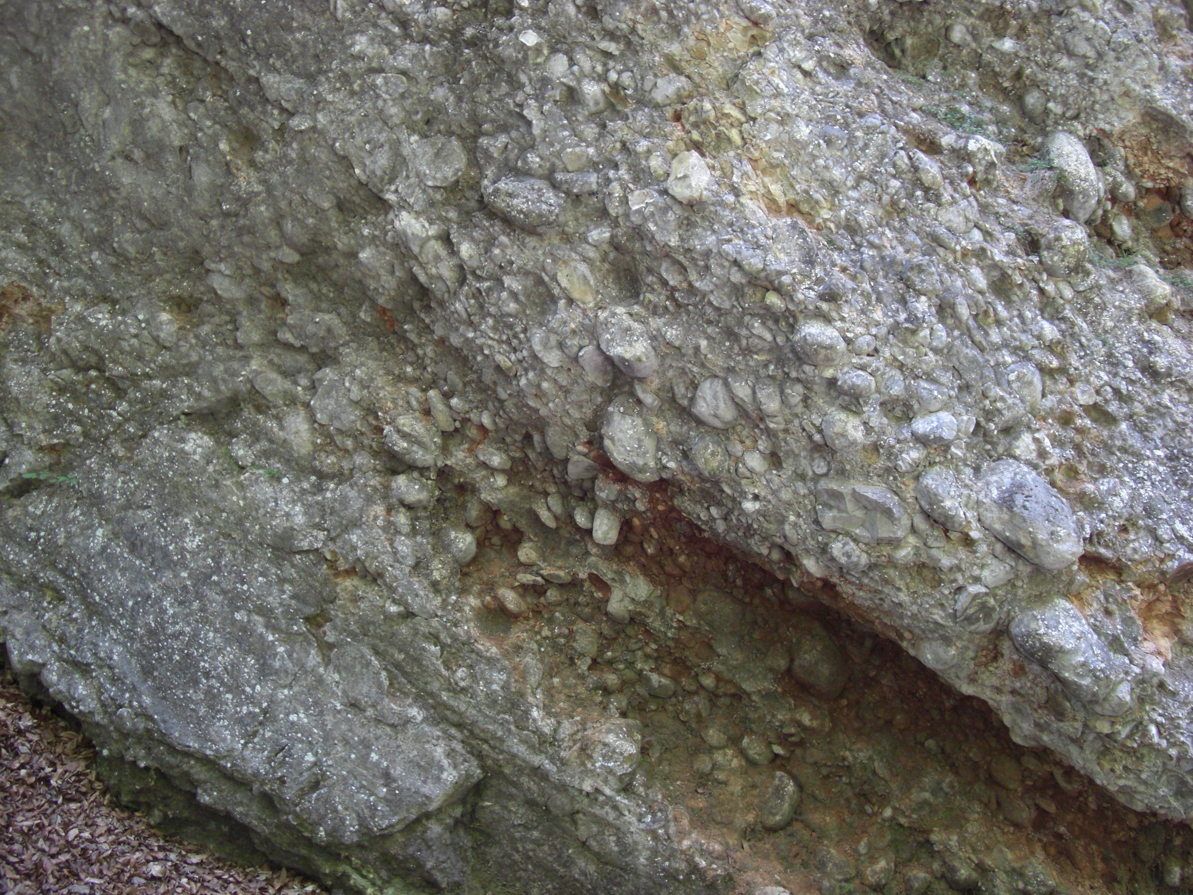 Gosaukonglomerat in der Glasenbachklamm